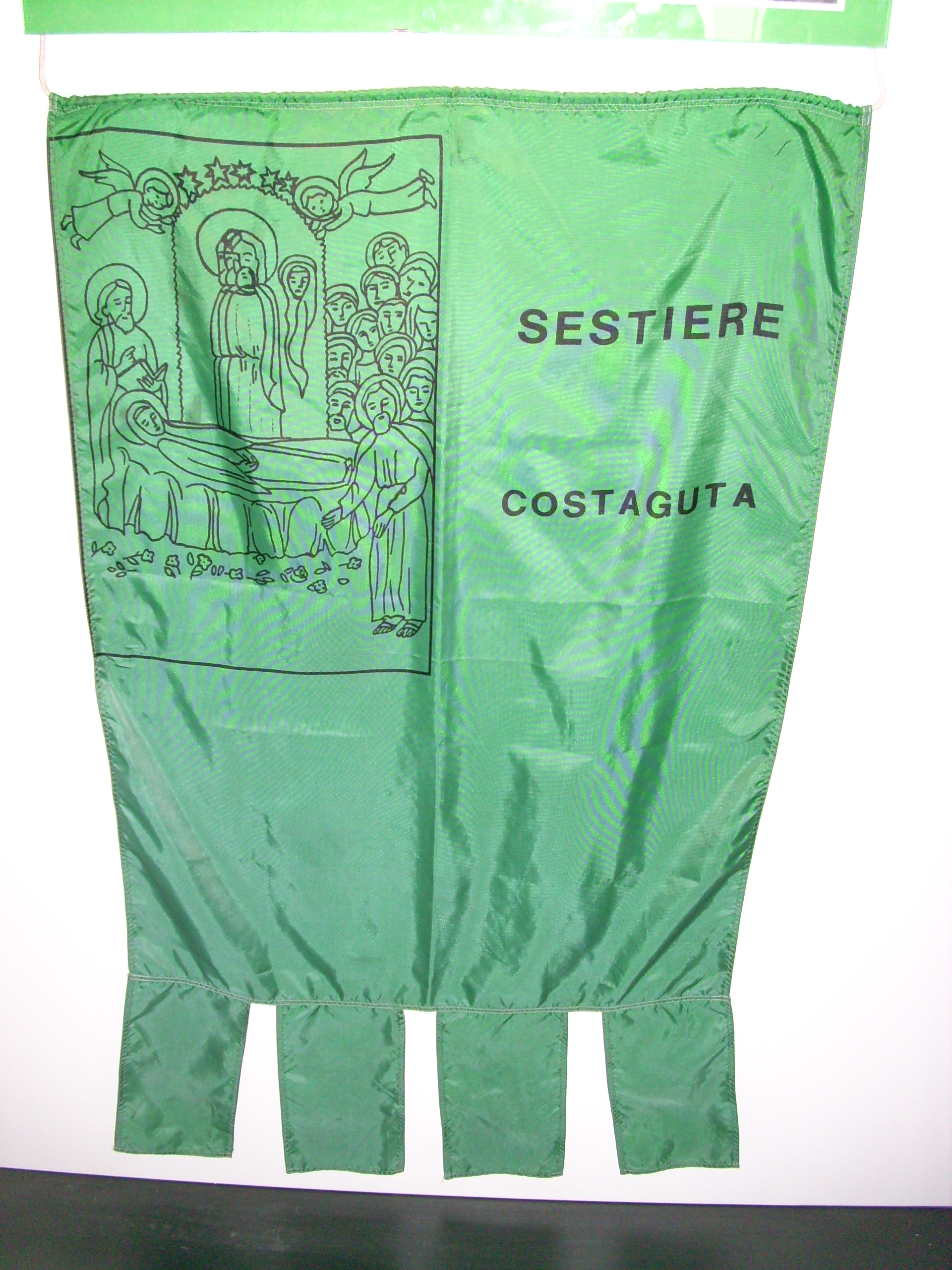 Bandiera del Sestiere Seglio di Rapallo, Liguria, Italia